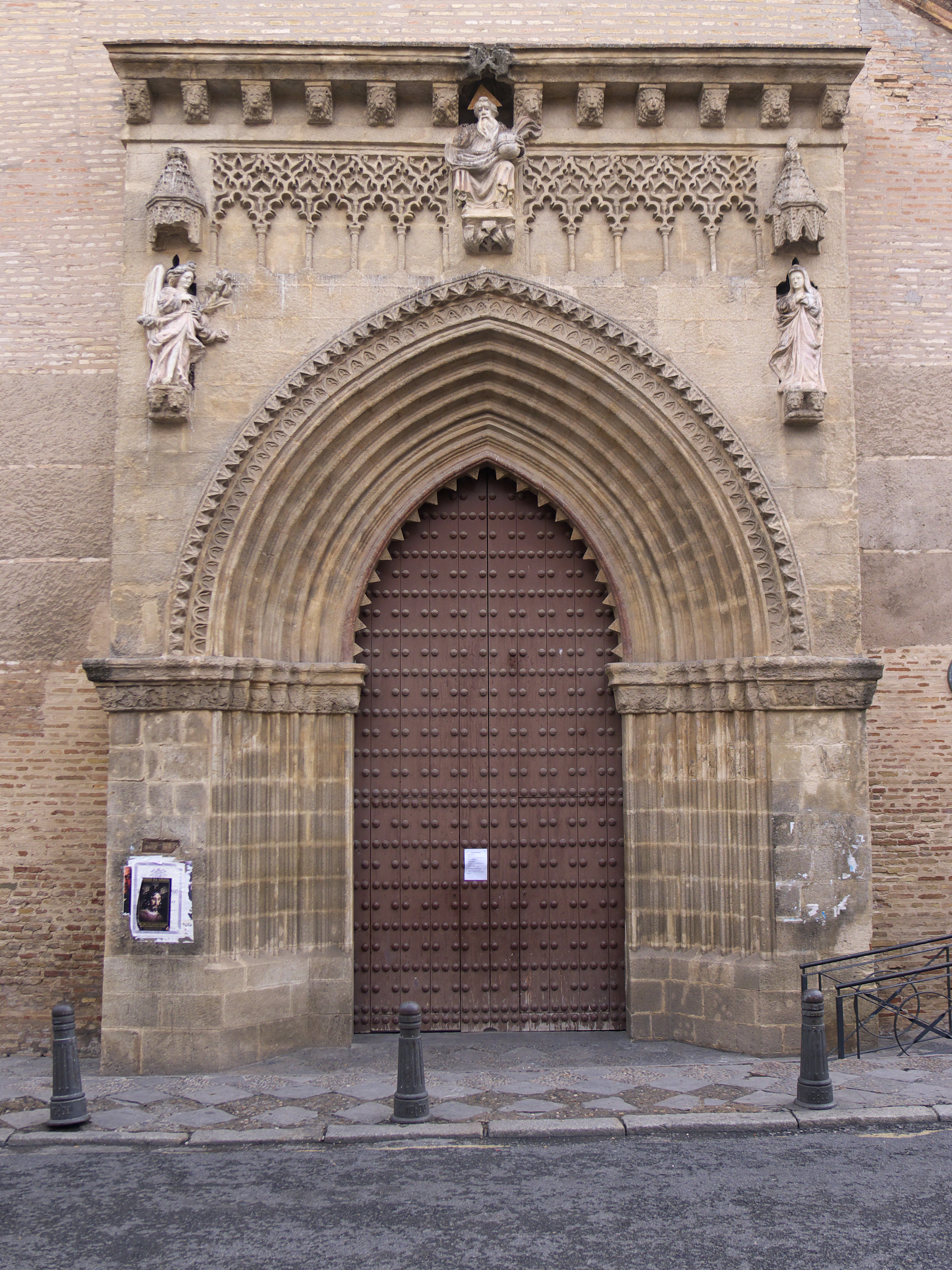 Una de las portadas gótico-mudéjar más representativa de la ciudad.